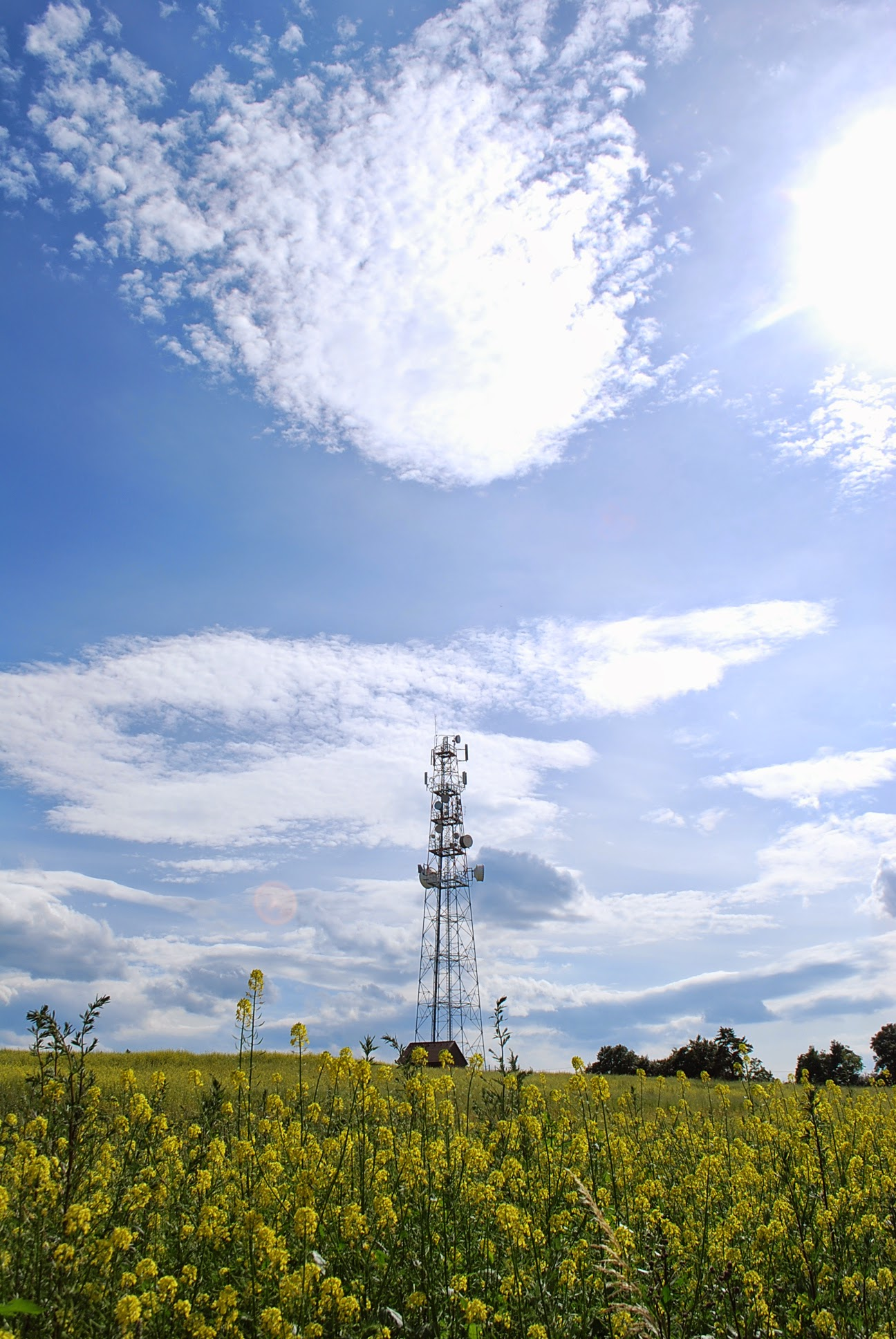 Výrov